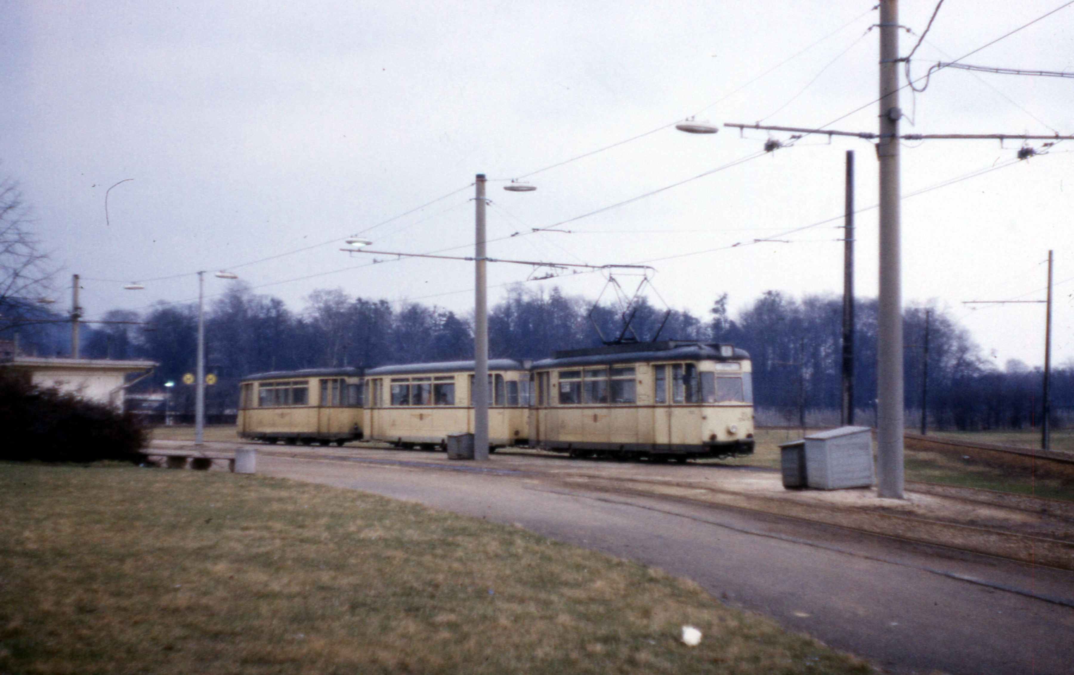 Linie 4 an der Gleisschleife Pillnitz